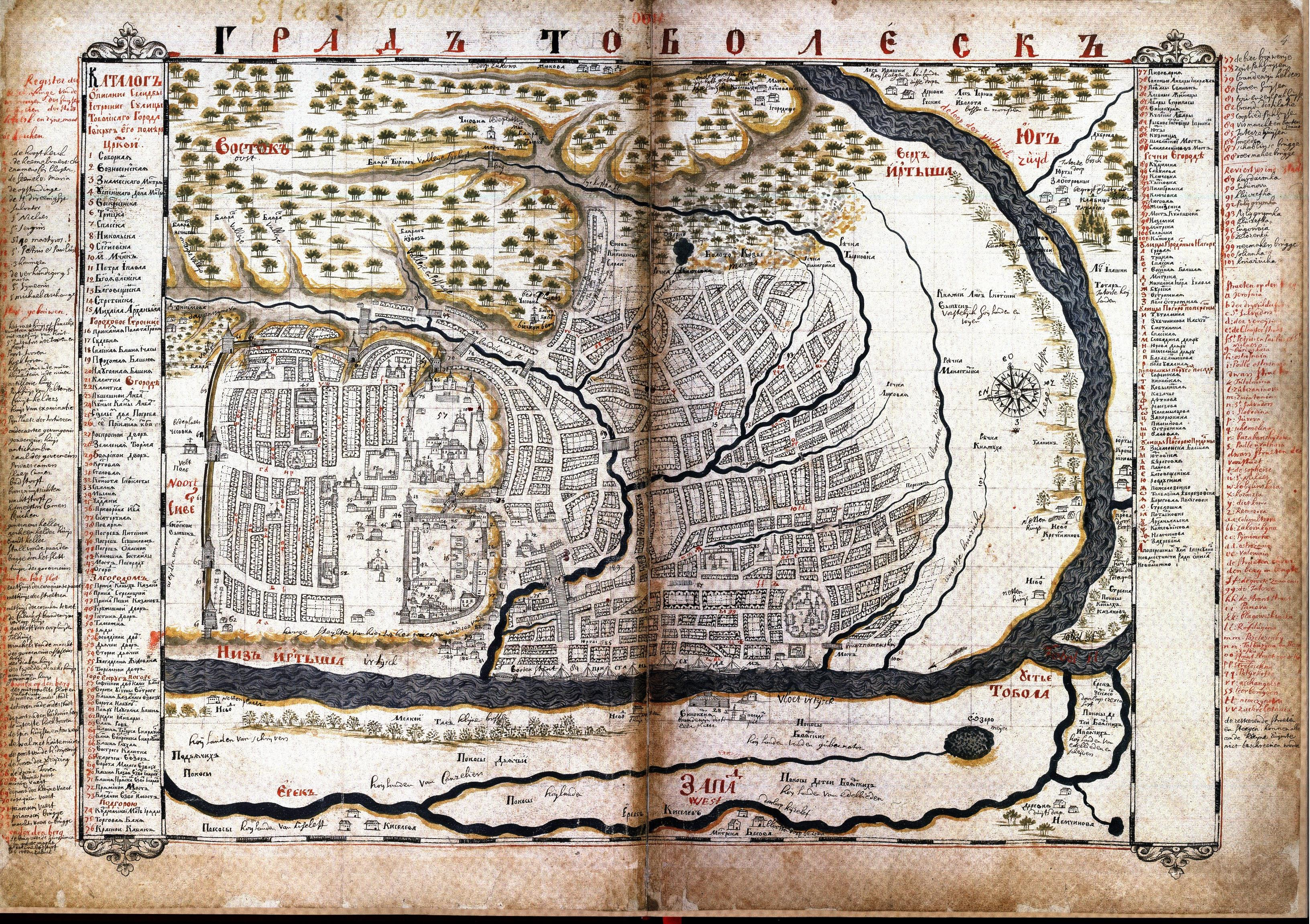 План города Тобольска из Чертёжной книги Сибири выполненный в 1699-1701 гг.